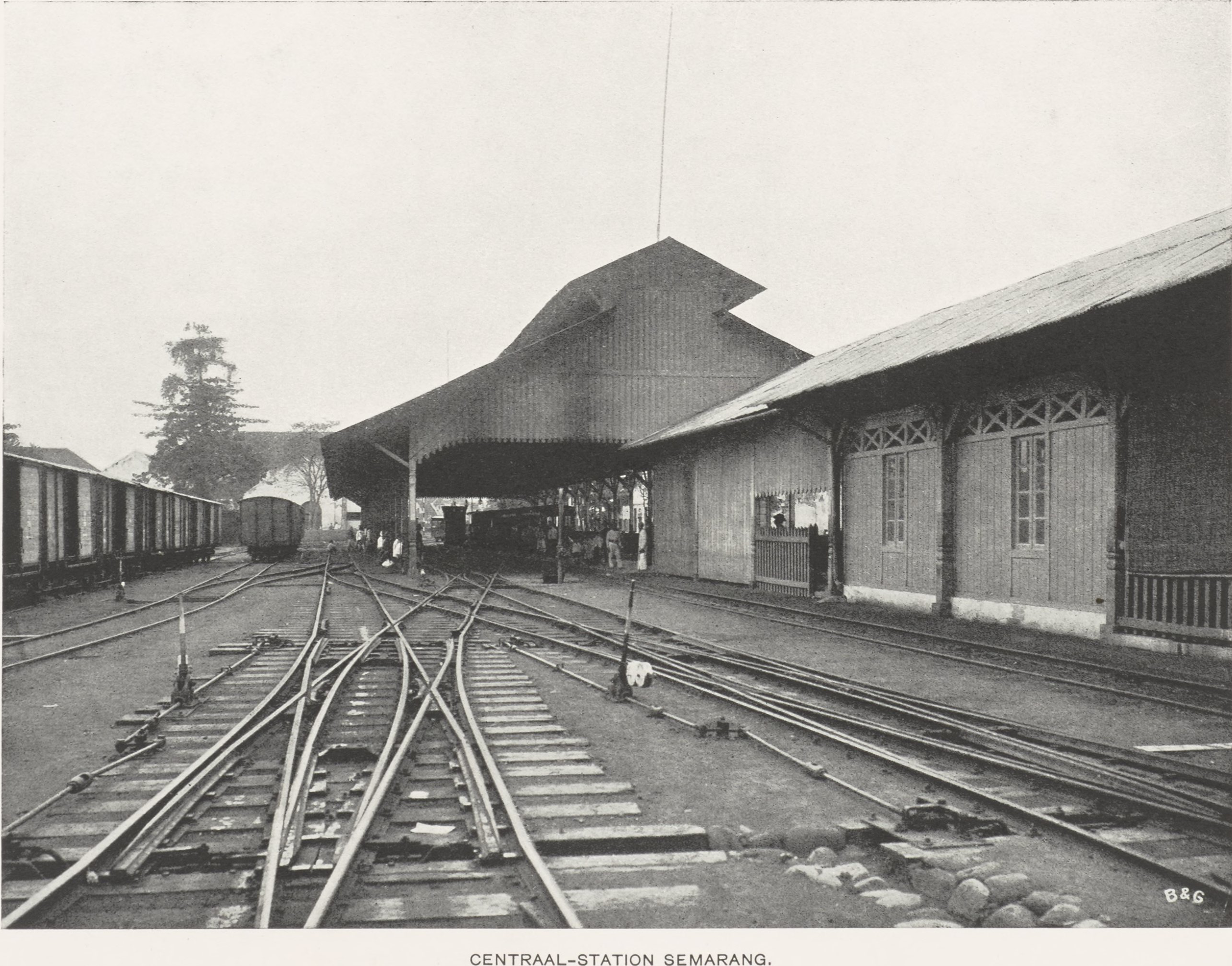 Stasiun Central atau Stasiun Jurnatan